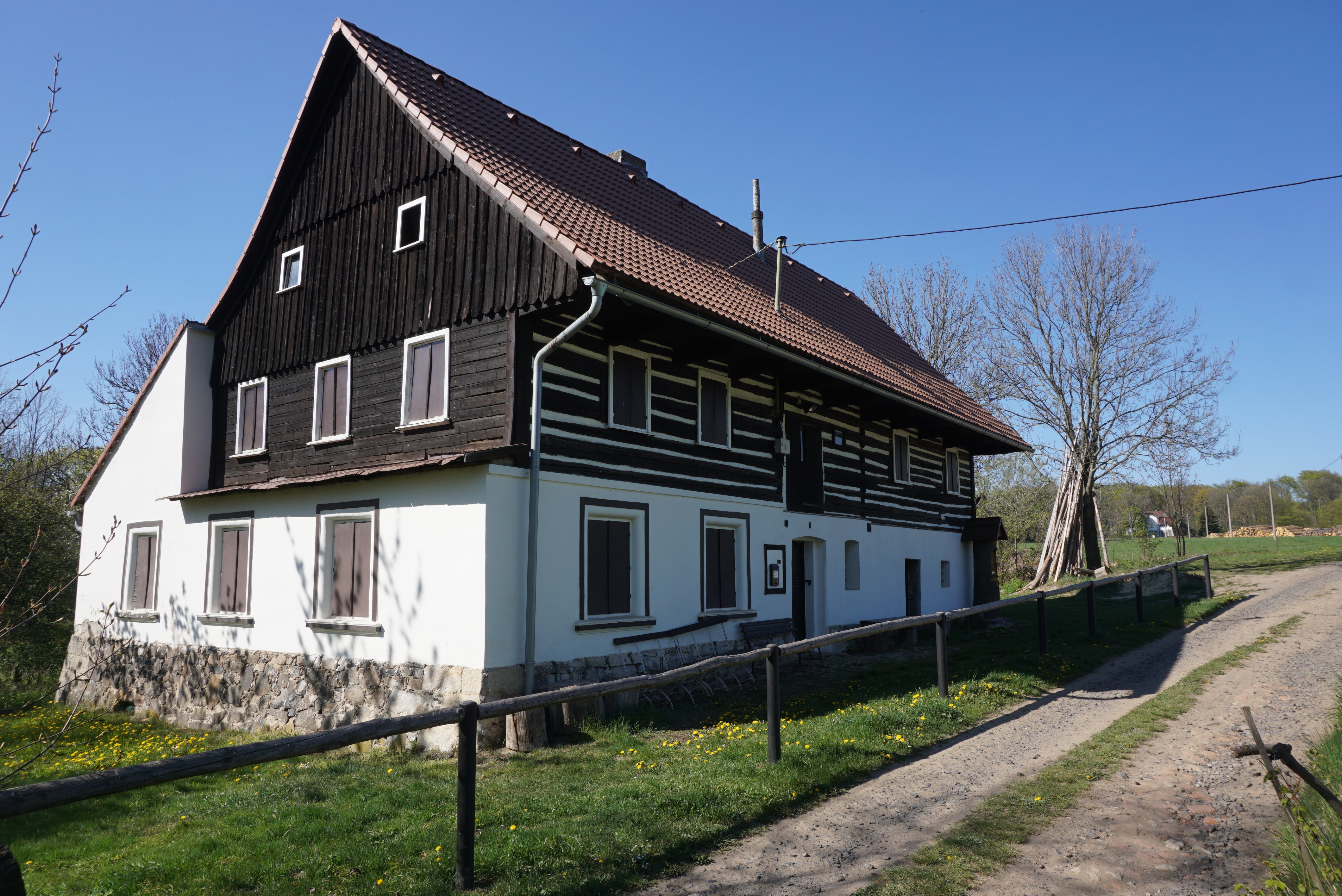 Stvolínecké Petrovice (Petersdorf) - čp. 1